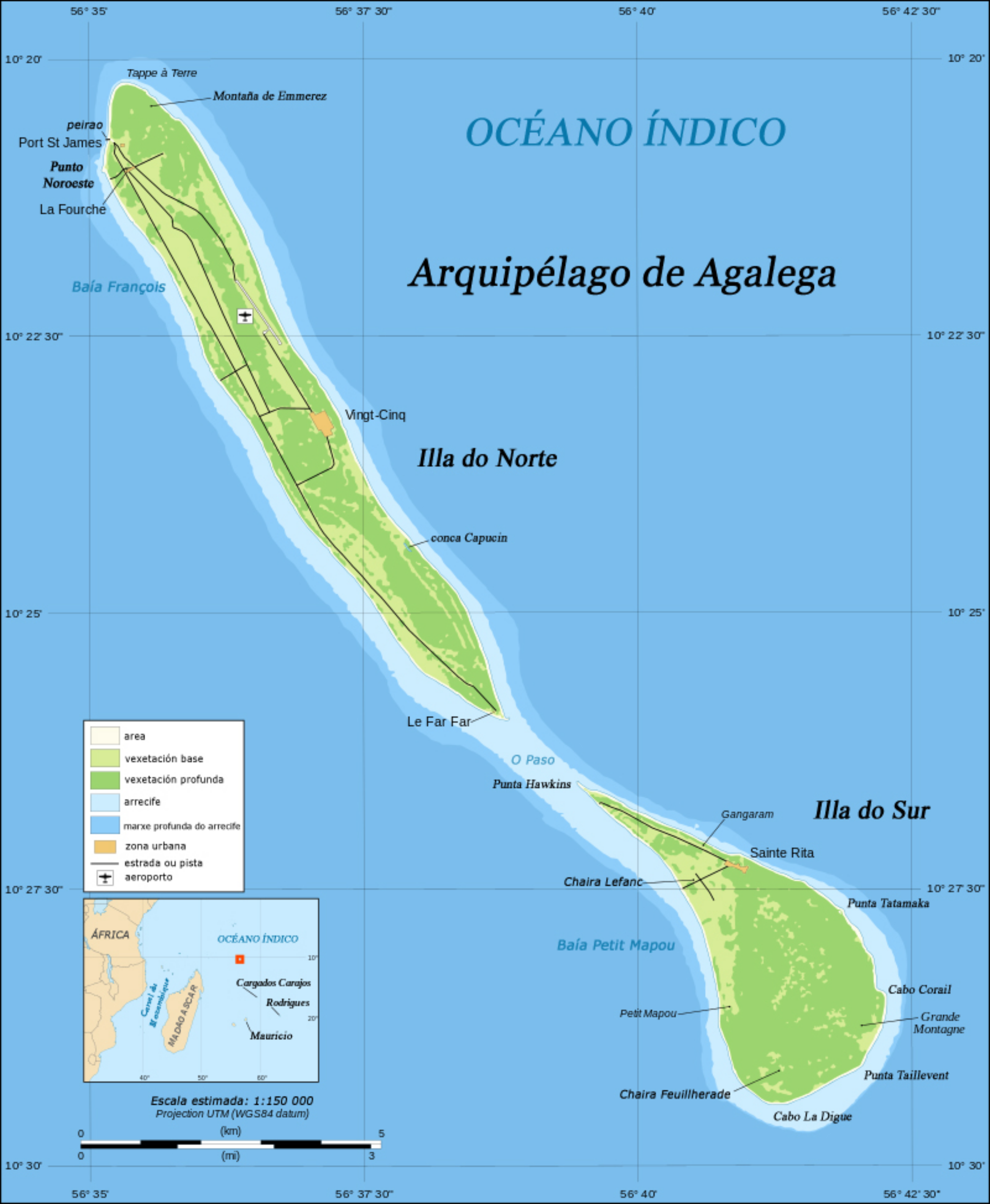 Mapa do Arquipélago d'Agalega en galego